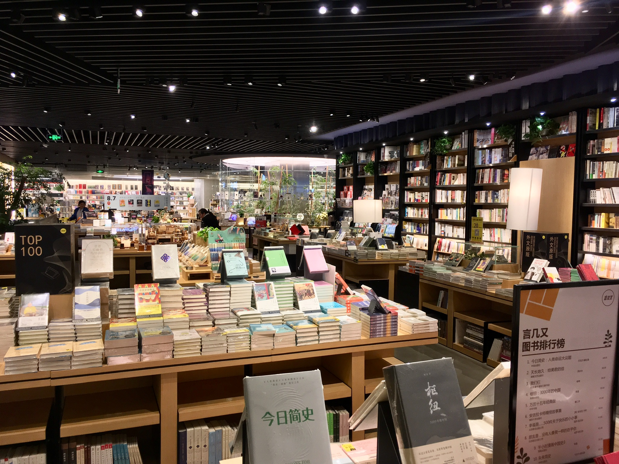 言几又成都国金中心店内部